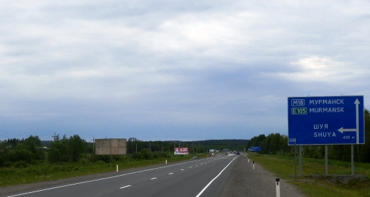 Автодорога "Кола" (М-18,Р-21) в районе посёлка Шуя Прионежского района Республики Карелияю